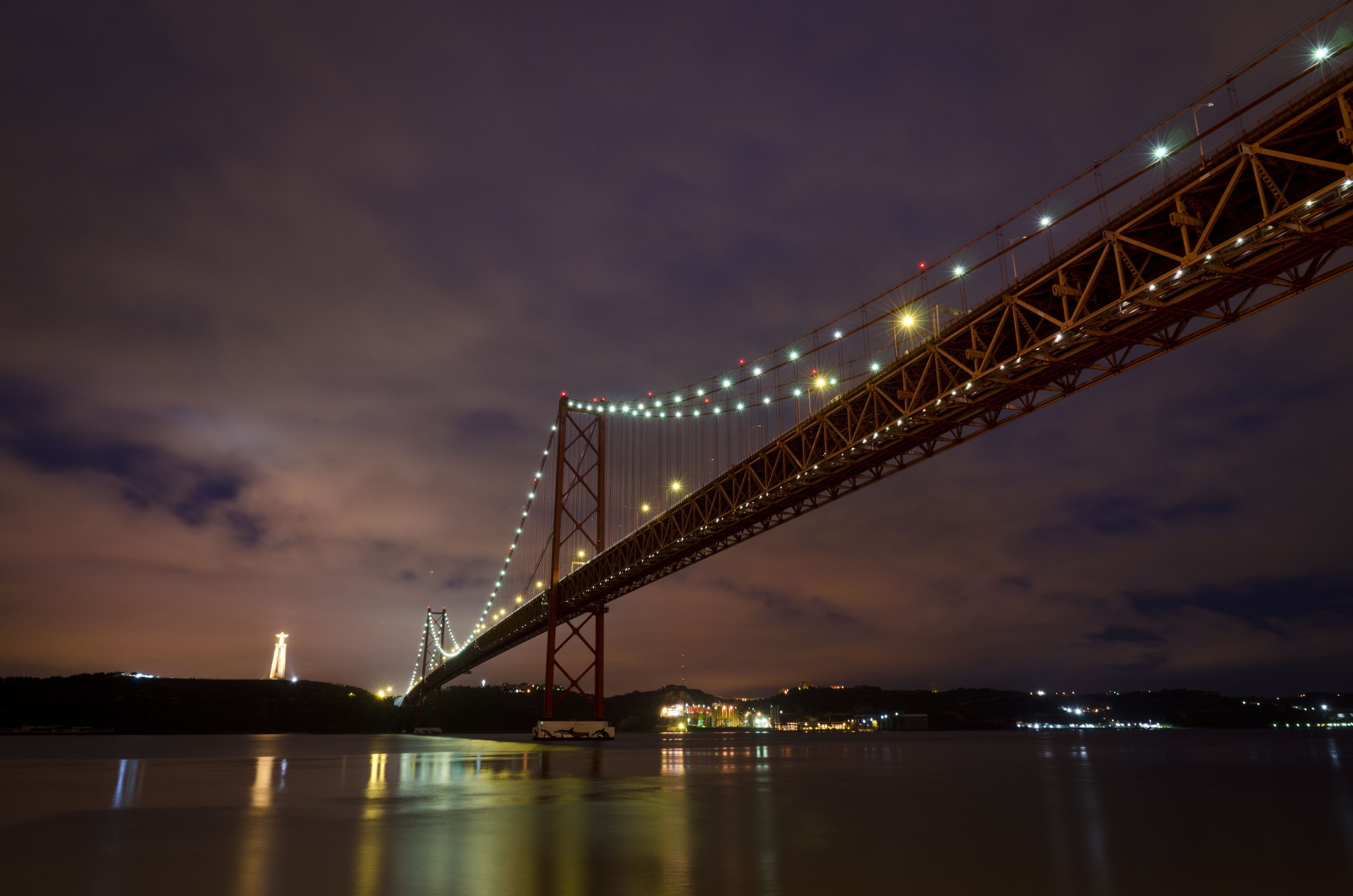 LISBOA_20121125_1581_ps_1